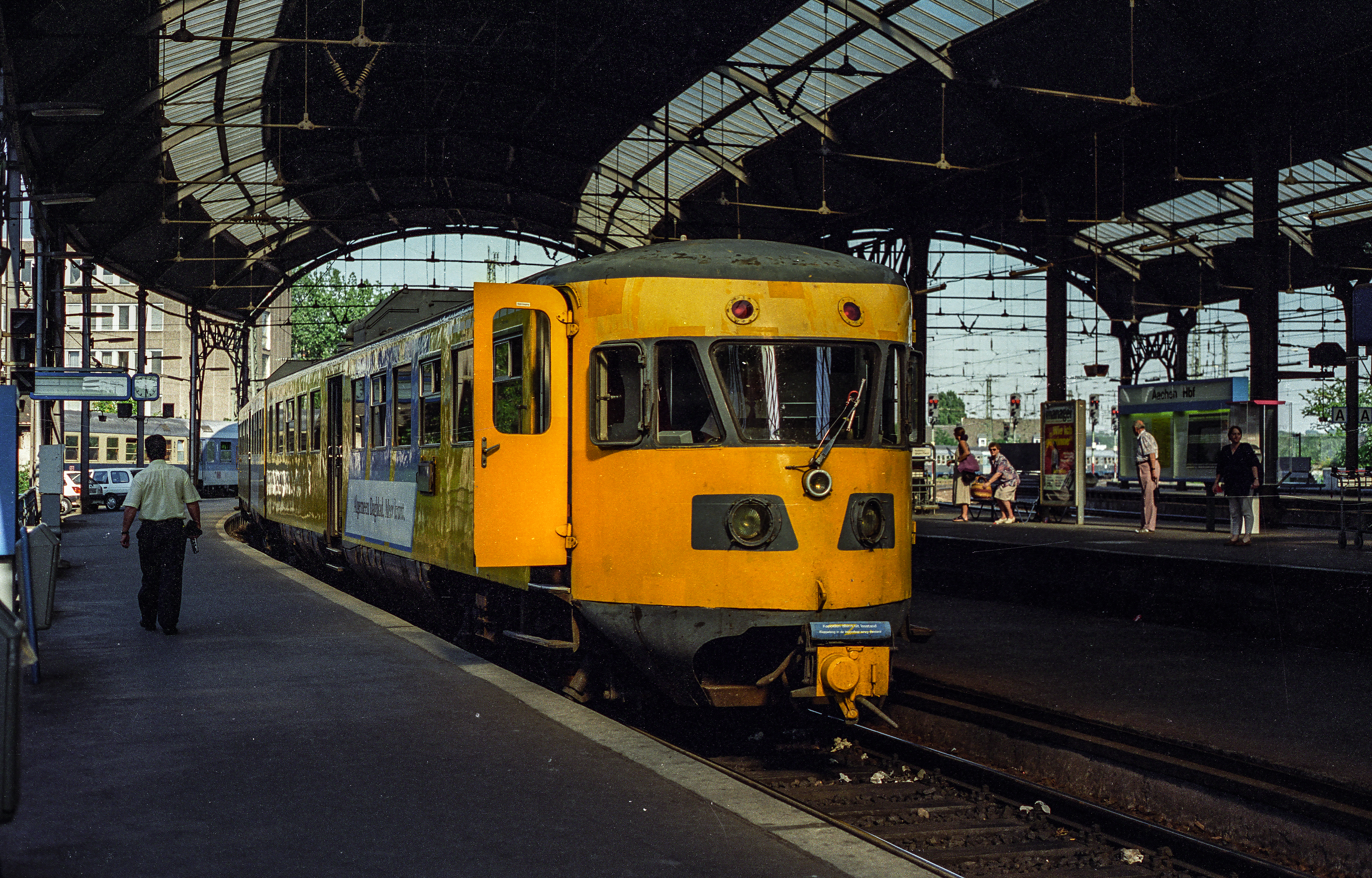 171 RB 3752 Aachen Hbf - Heerlen Aachen Hbf 22-07-1996 T199607-0018